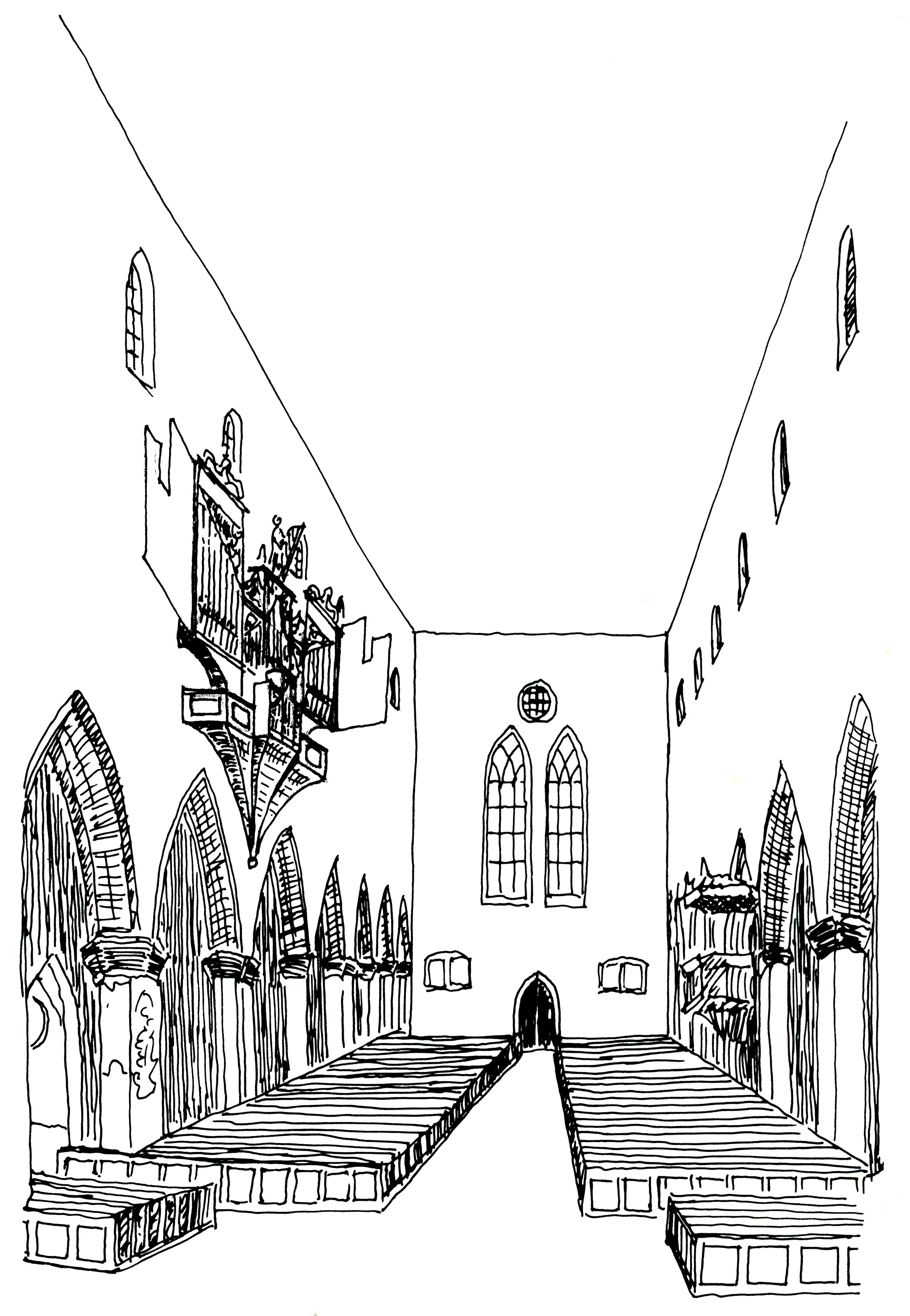 Rekonstruktion der Orgel von 1598-1847 in St. Martin zu Memmingen